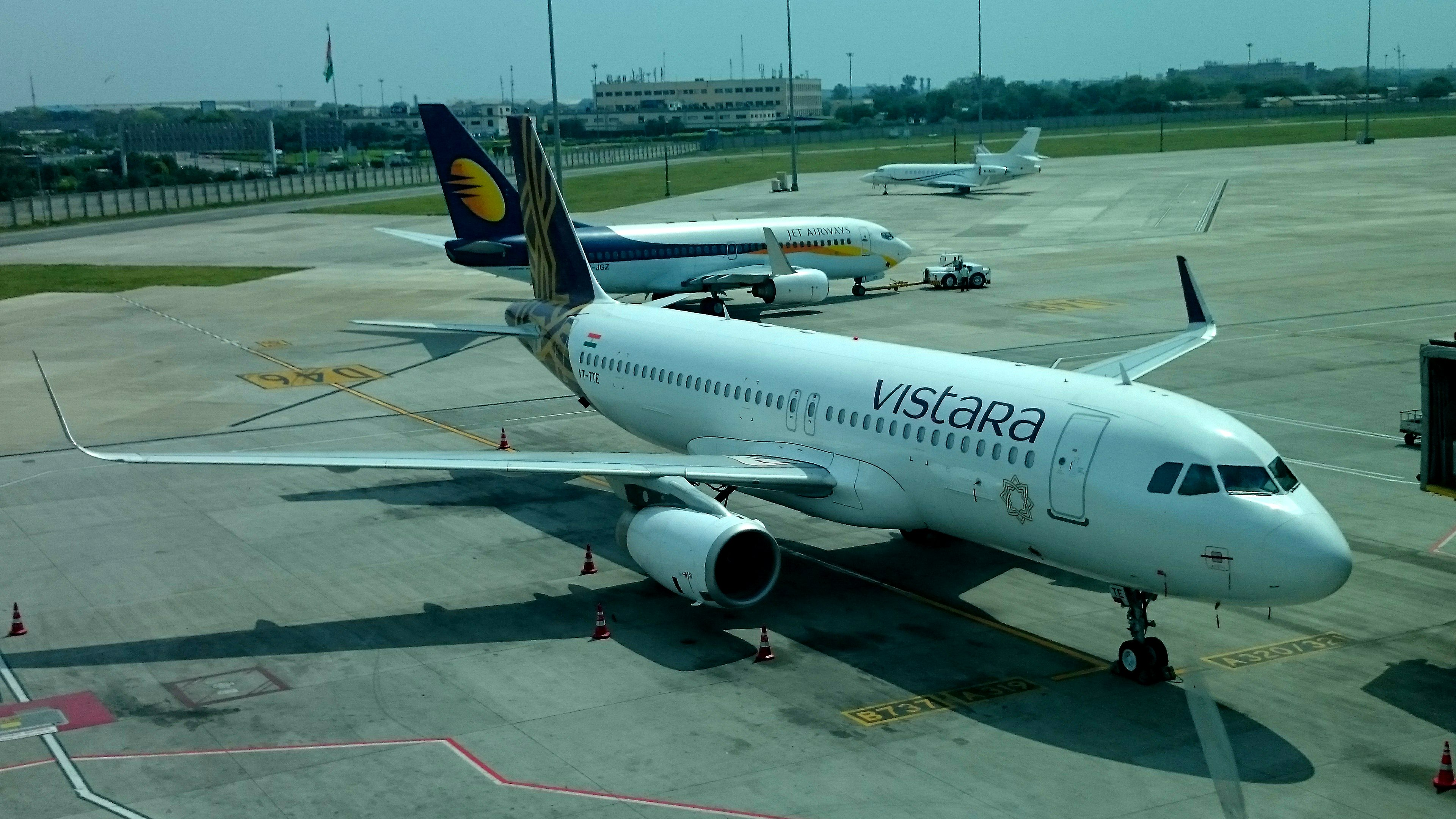 Vistara Airlines at Delhi T3